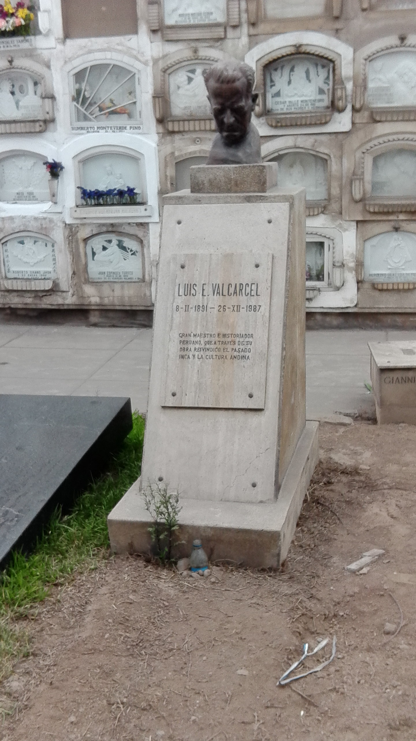 Tumba de Luis E. Valcarcel